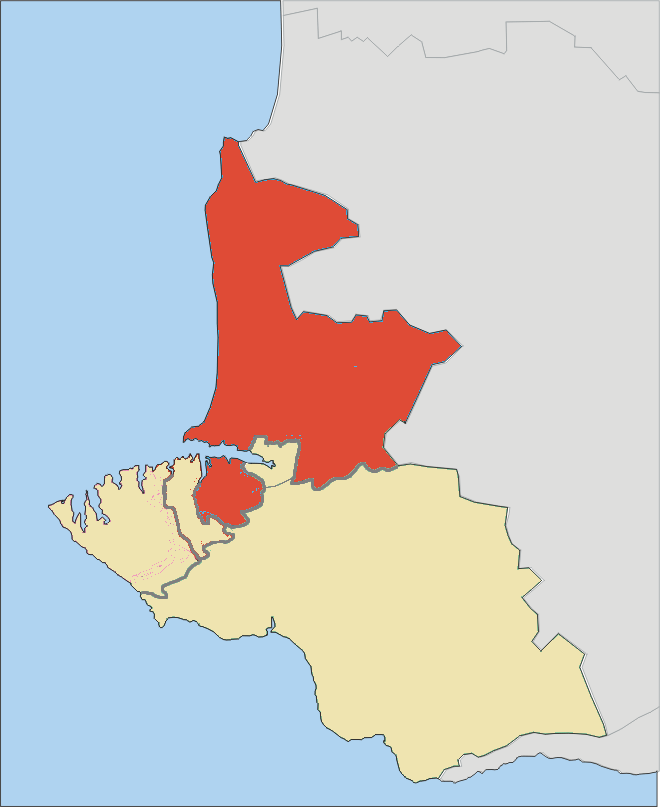 Нахимовский район Севастополя